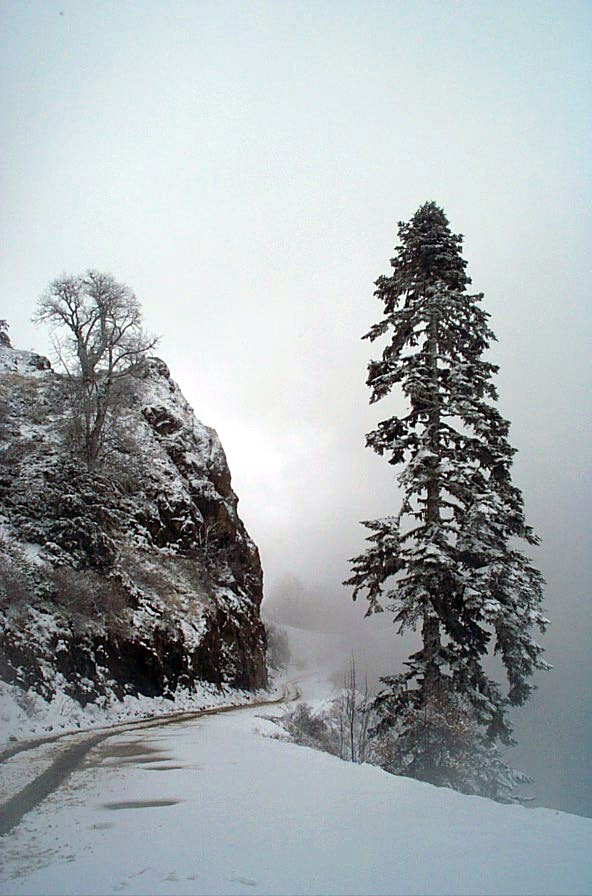 Bolu/Turkey